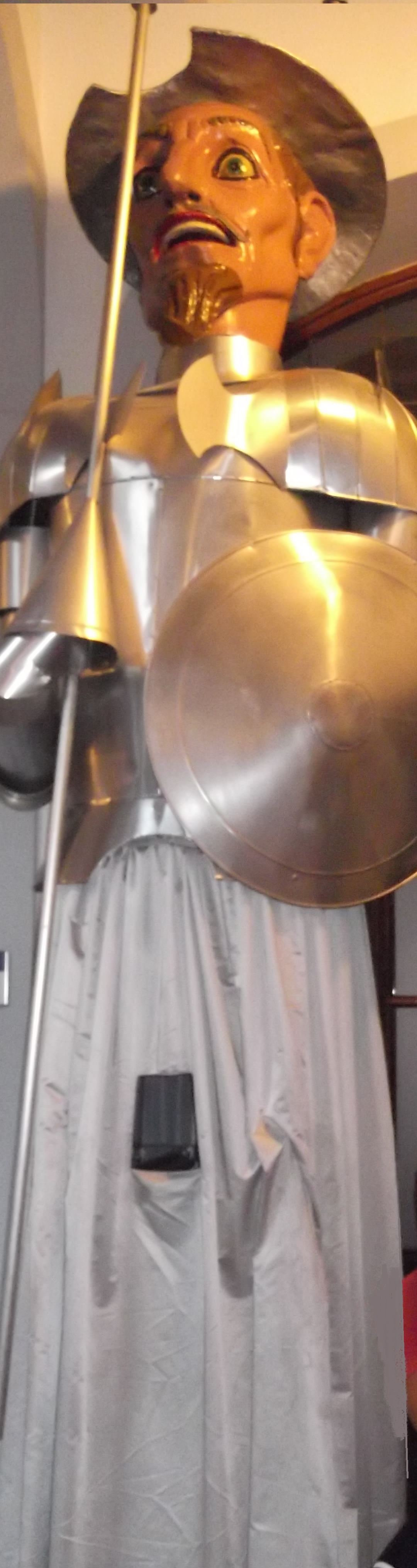 Gigantes de Alcalá de Henares